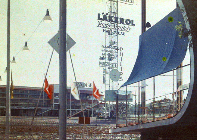 Stockholmsutställningen 1930 från musikpaviljongen österut åt festplatsen med Paradiset, huvudrestauranten och reklammasten